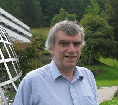 Foto di Richard Parker